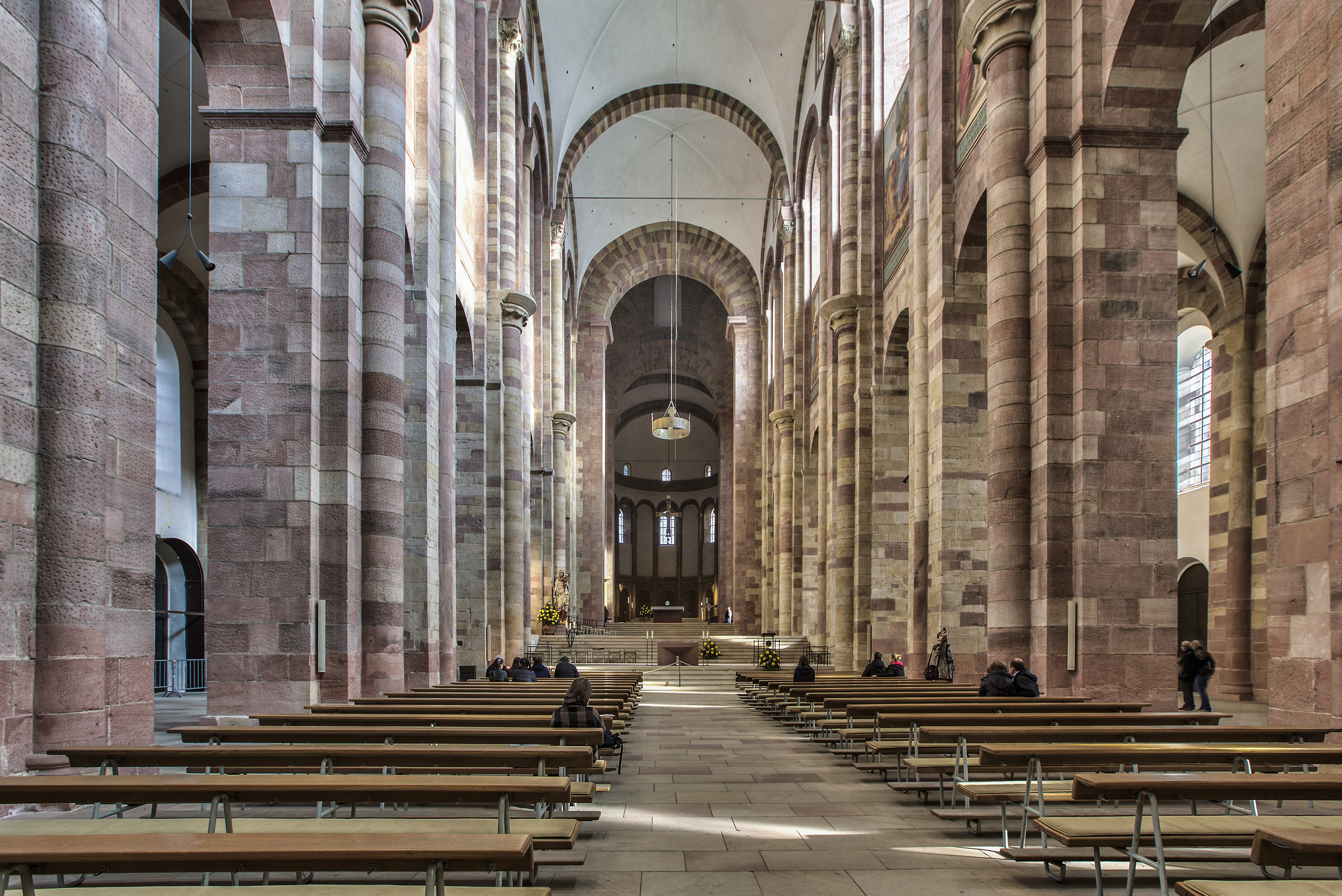 Hauptschiff des Doms zu Speyer, von Westen